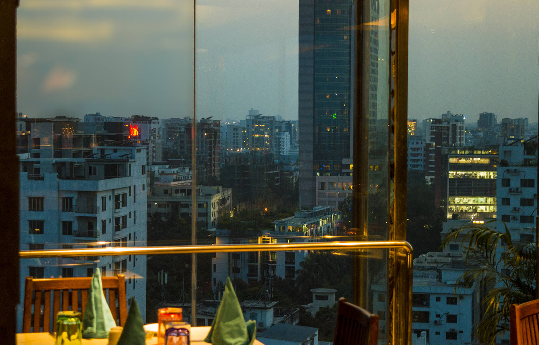 Dhaka